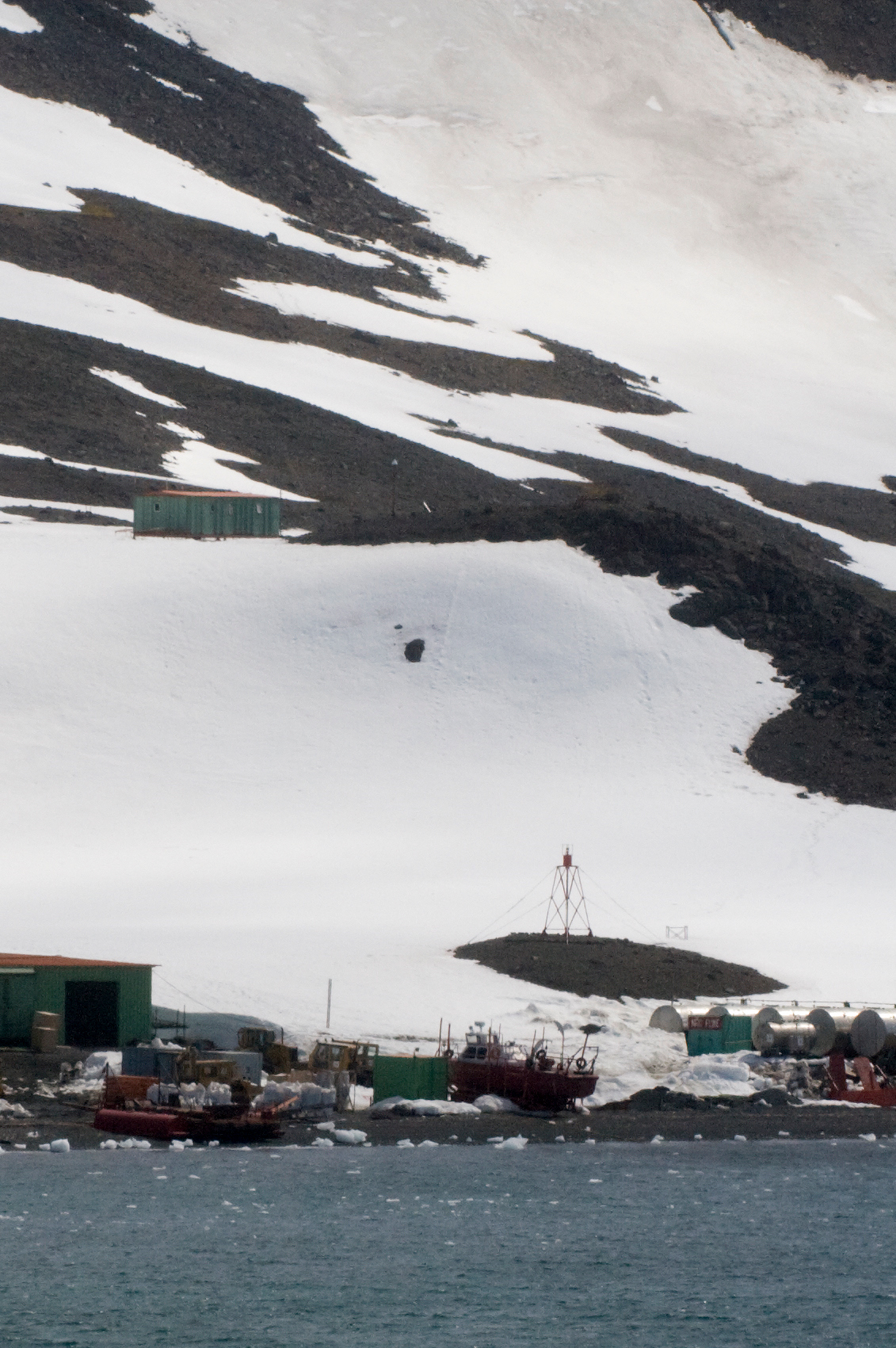 Comandante Ferraz Brazilian Antarctic Base